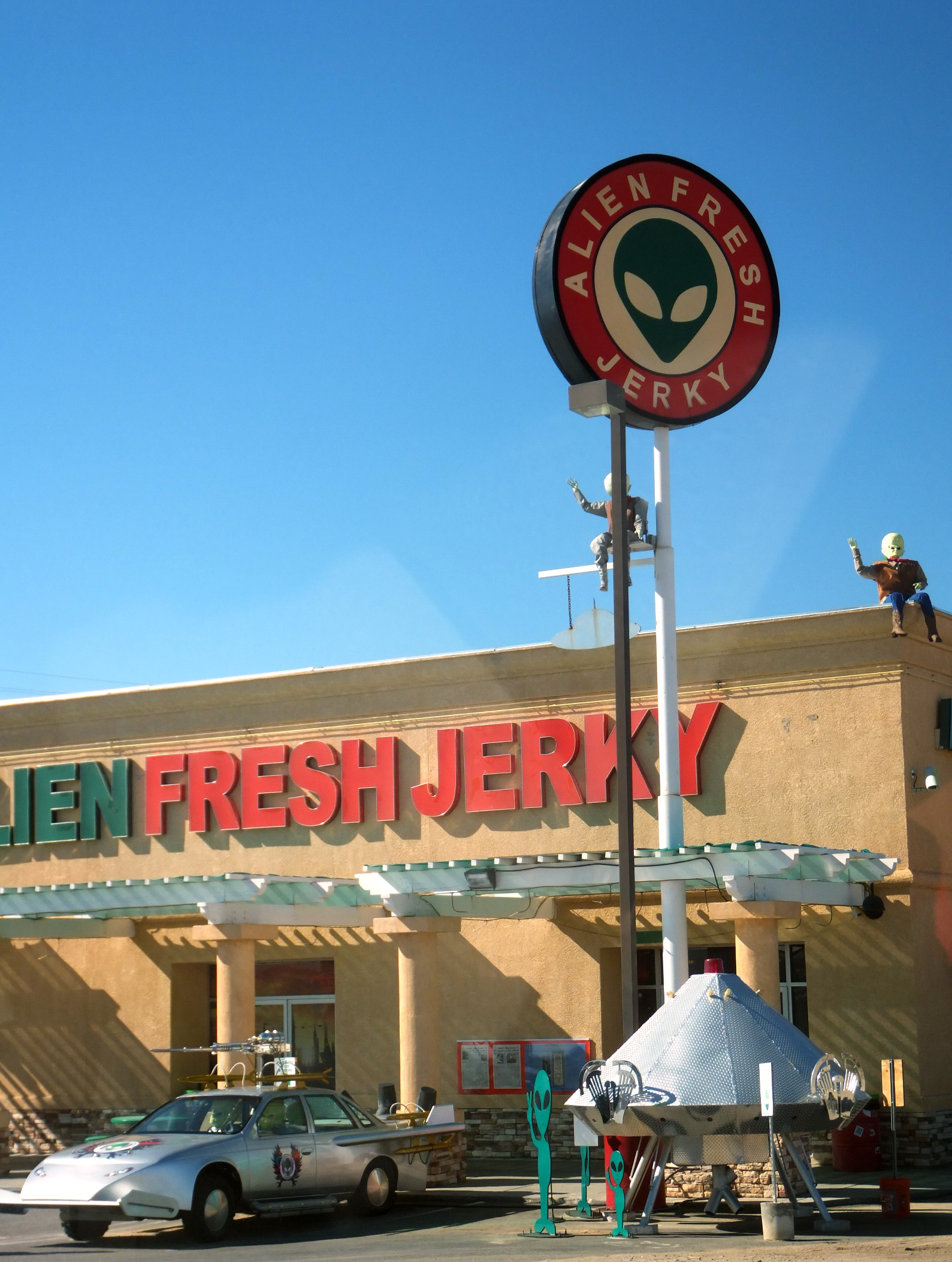 සිංහල: කැලාෆෝනියාවේ බේක'හි ප්‍රධාන මාර්ගය අසල ඇති පිටසක්වල ජීවී තේමාව රුගත් අවන්හලක්